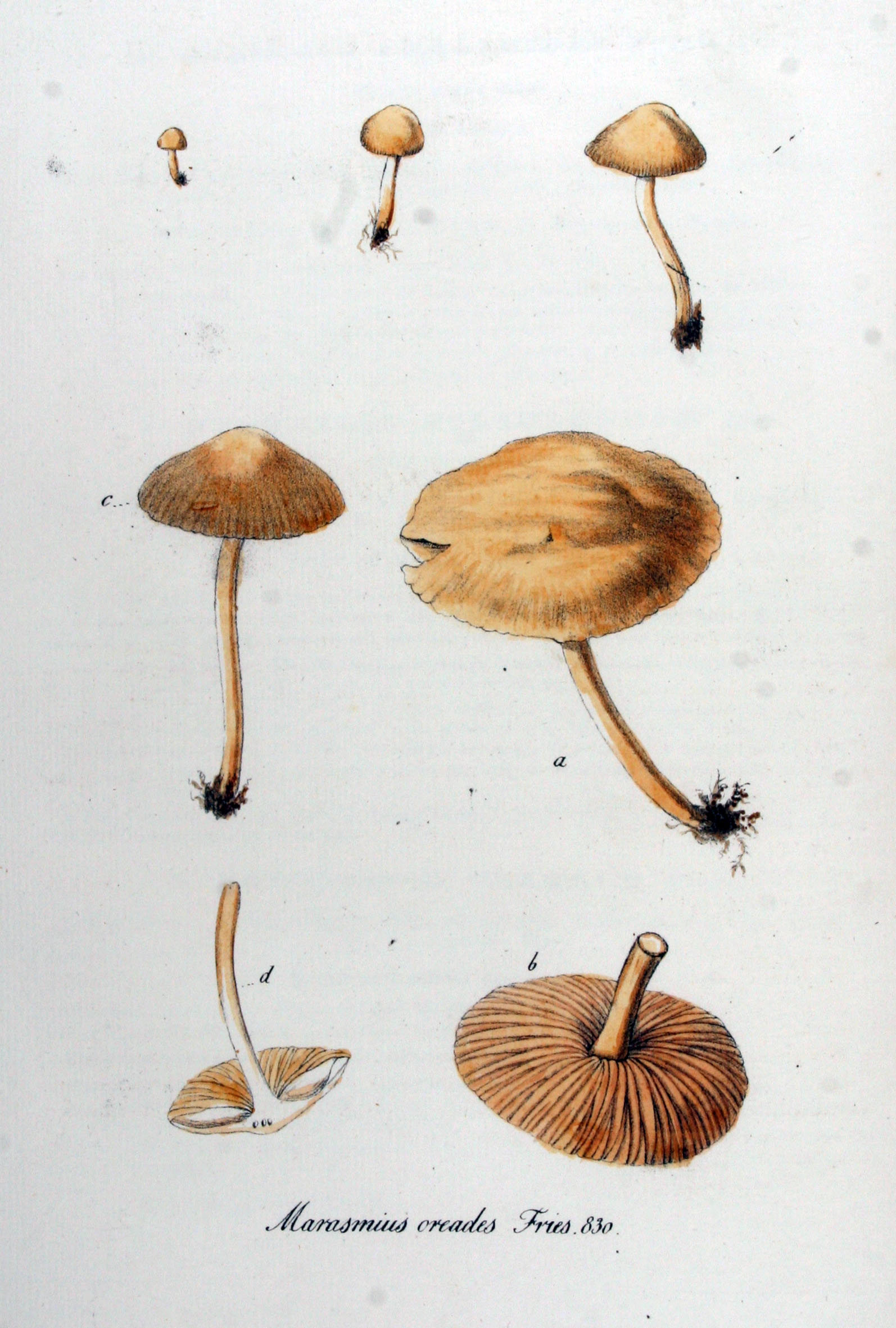 Marasmius oreades